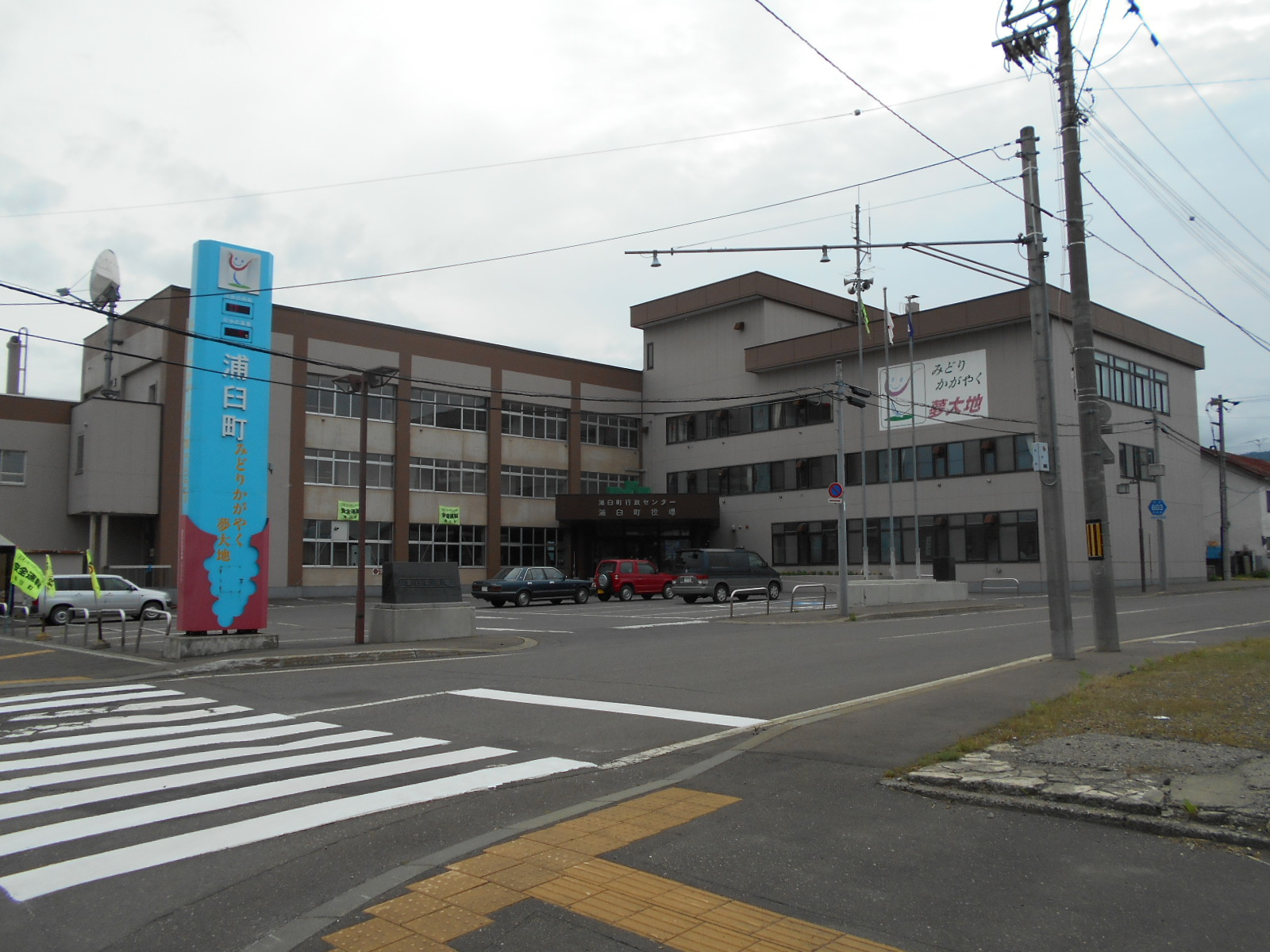 北海道樺戸郡浦臼町役場